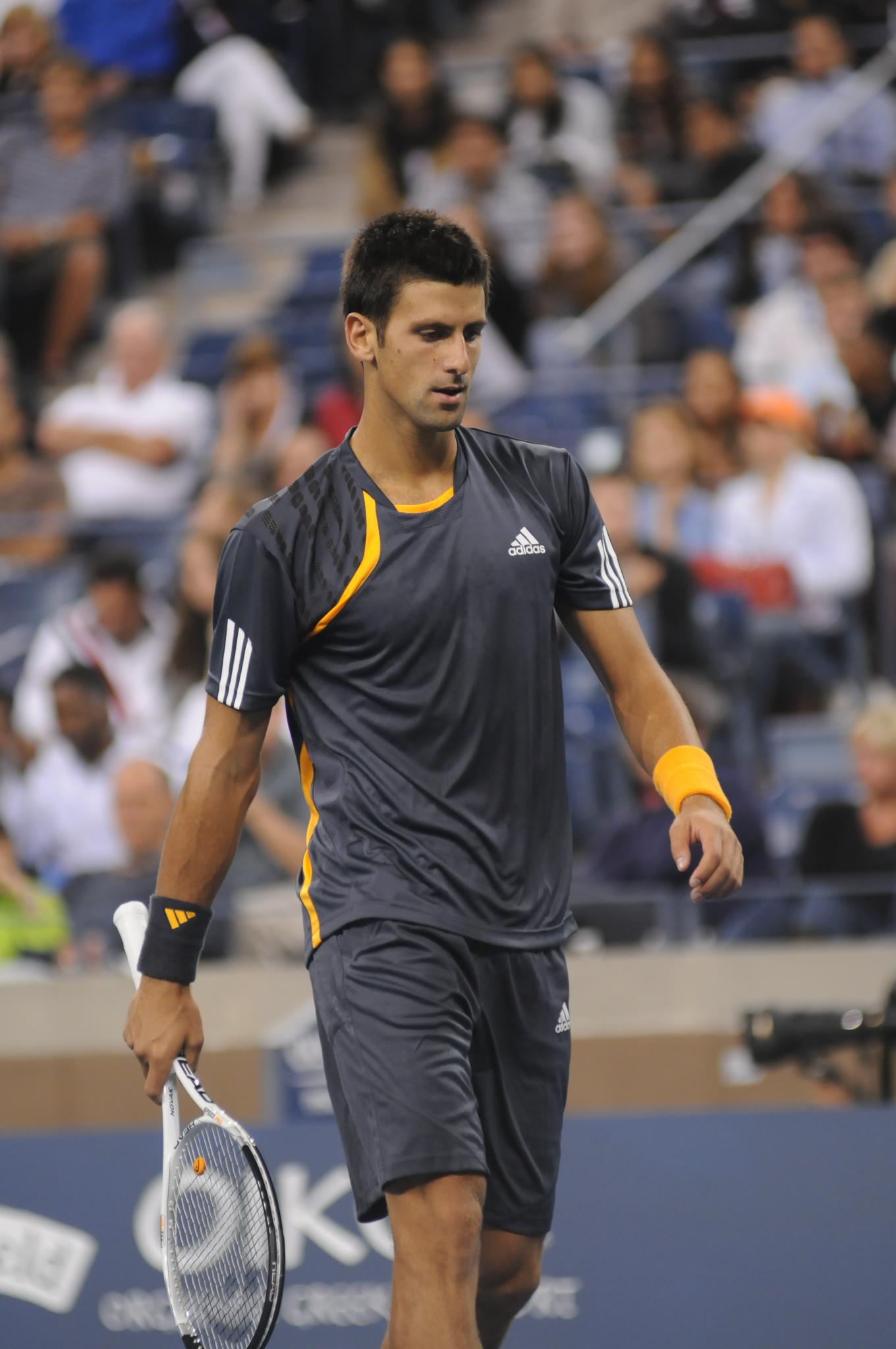 Novak Đoković at the 2009 US Open